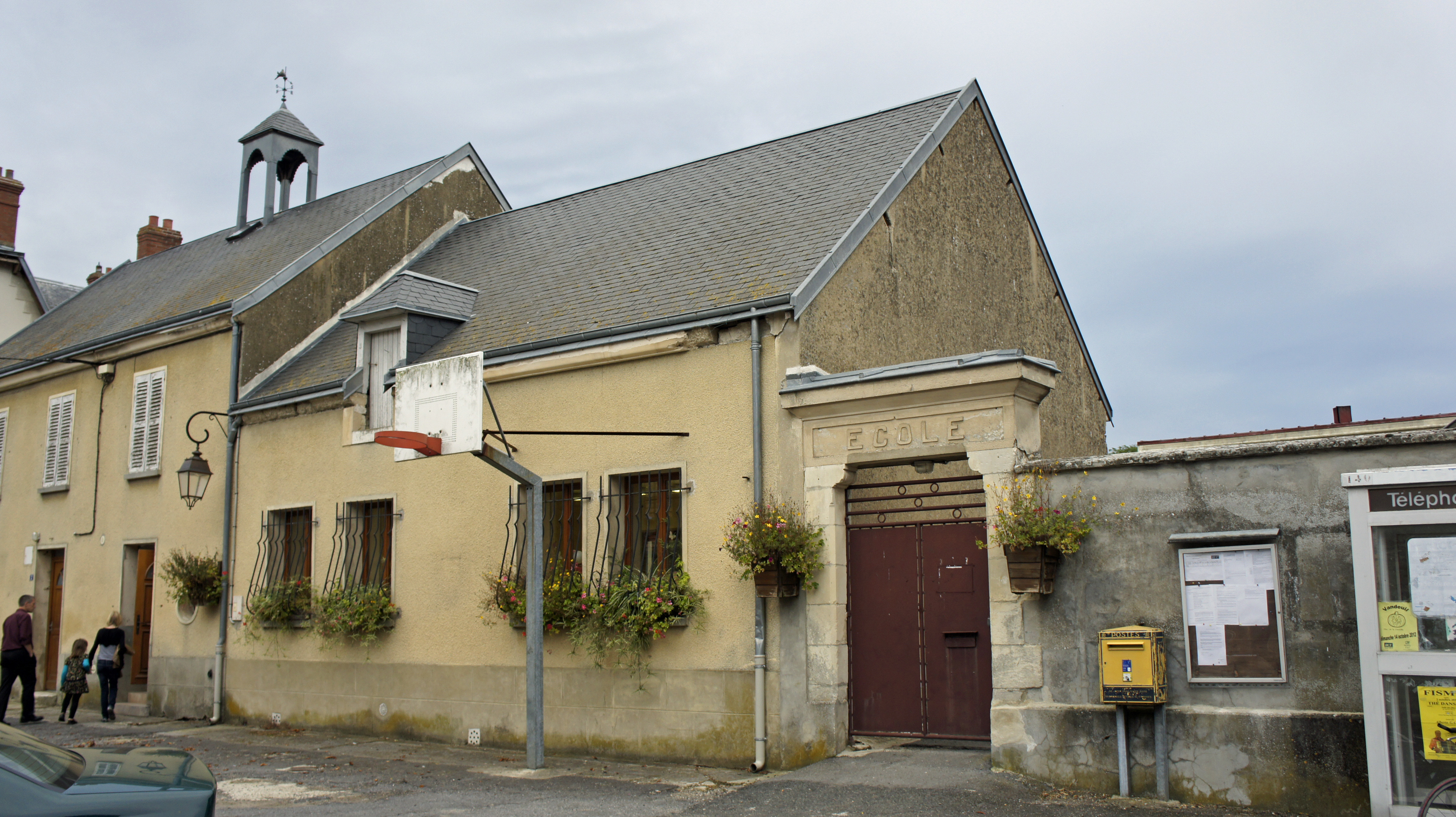 Vue de la salle des fêteset mairie de st-Gilles.